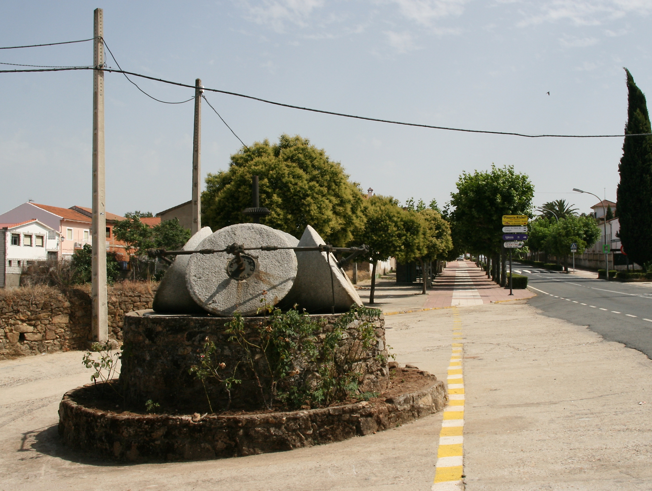 Perales del Puerto: maalstenen uit voormalige oliemolen als monument langs de weg EX-109